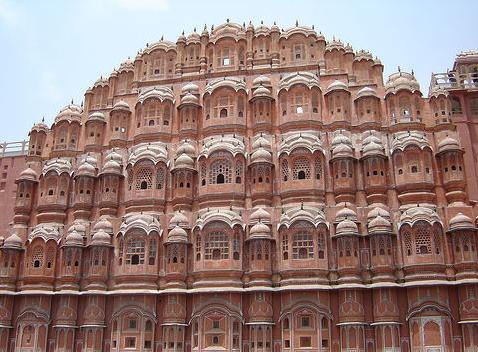 Hawai Mahal, Jaipur